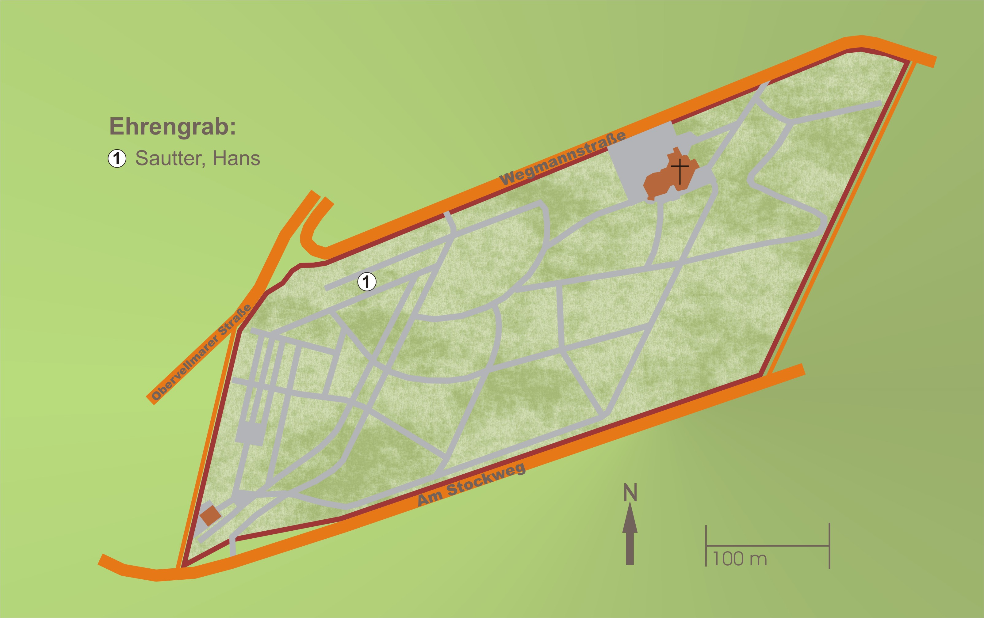 Plan des Friedhofs in Kassel-Harleshausen (Deutschland)